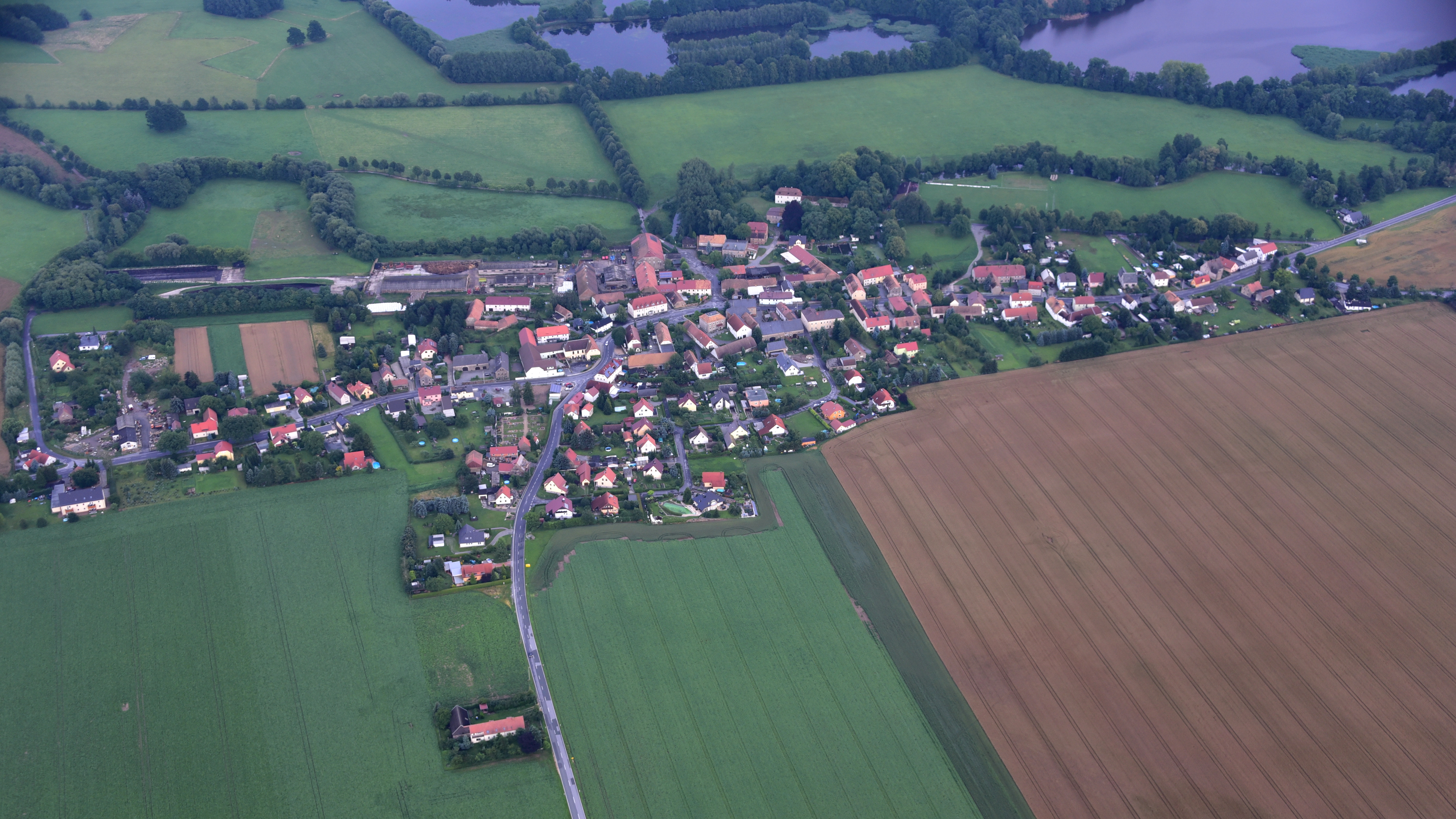 Niedergurig, Luftaufnahme (2017) Hornjoserbsce: Powětrowy wobraz Delnjeje Hórki (2017)